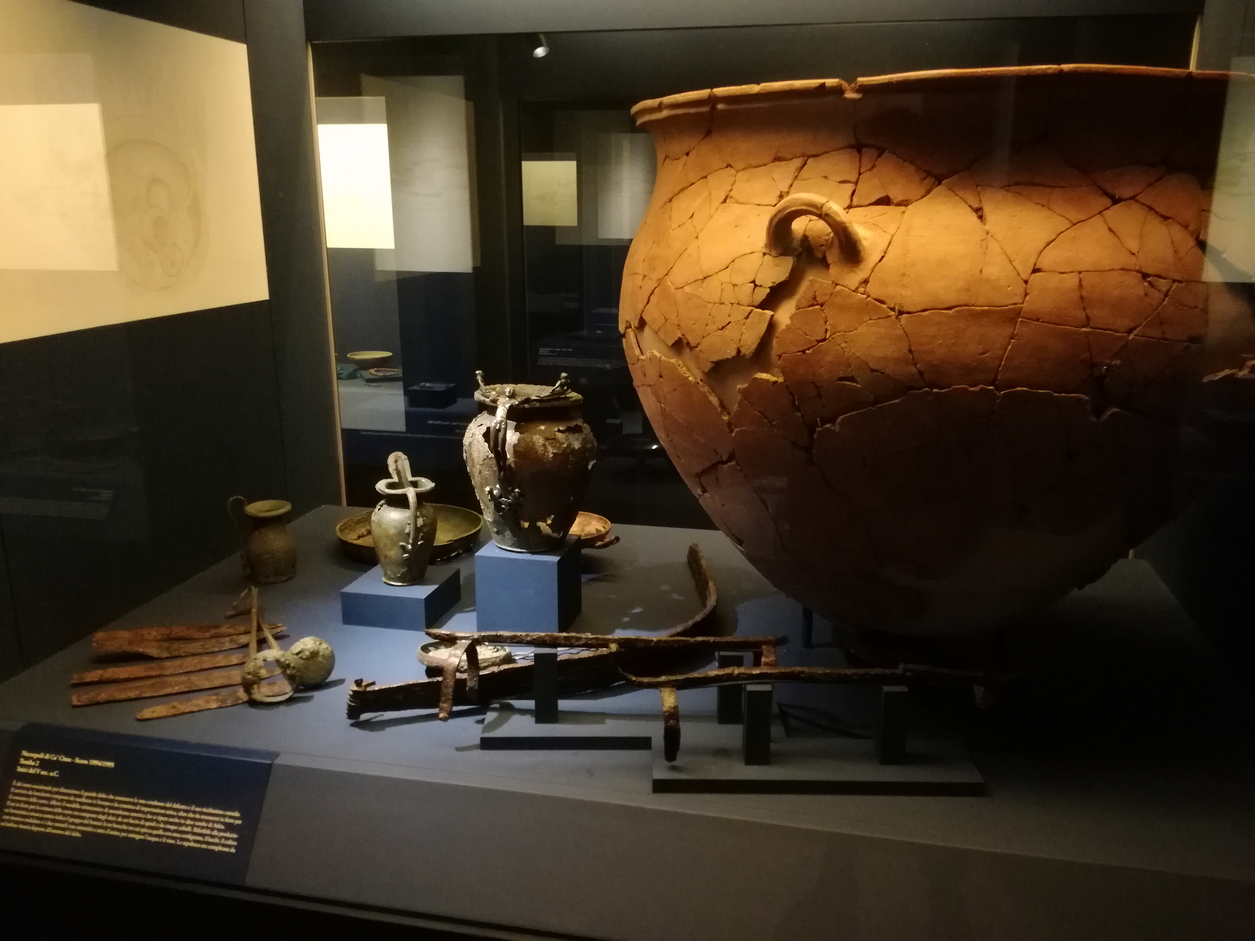 Vetrinetta con reperti archeologici situata nella sezione etrusca del Museo Archeologico Nazionale di Adria